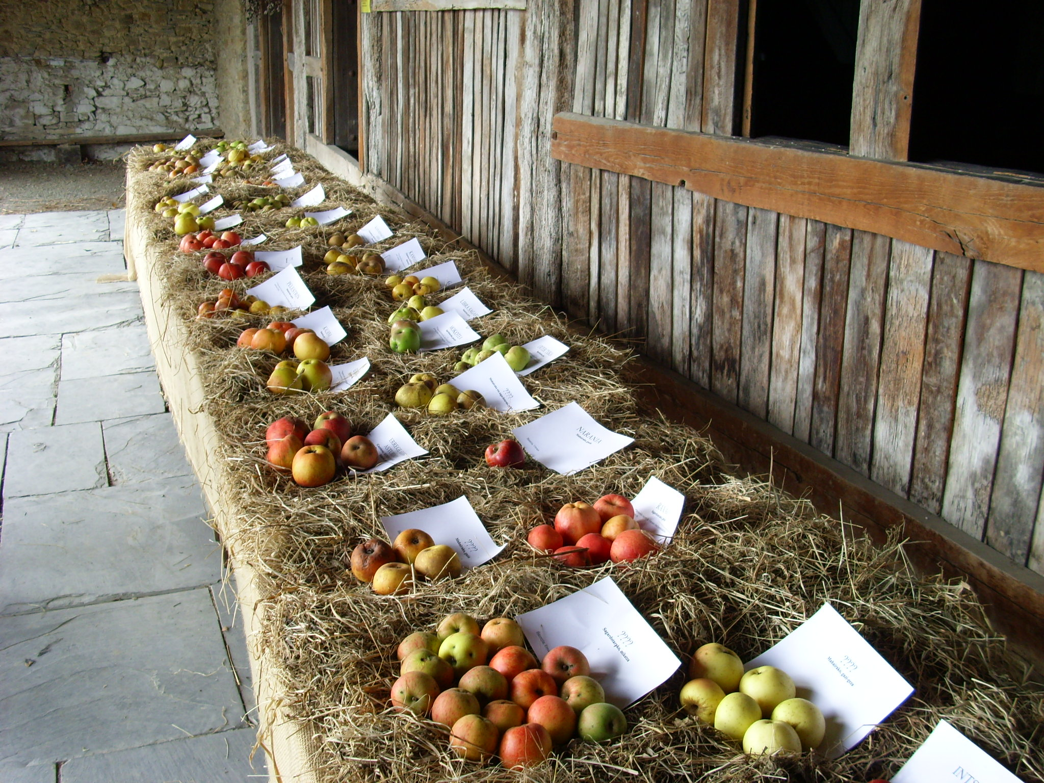 Manzanas expuestas en el caserío Igartubeiti